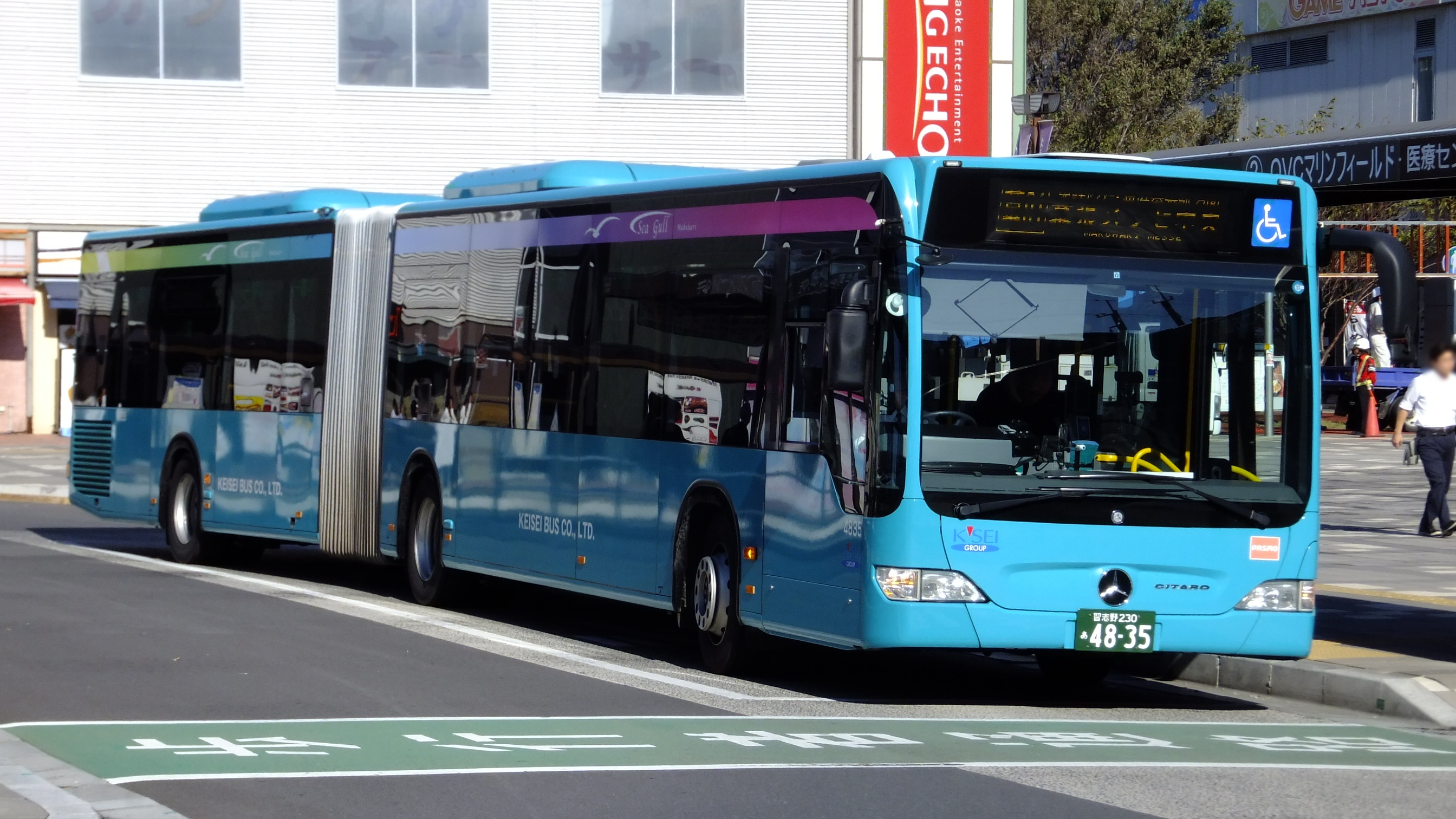 京成バスの連接車、メルセデスベンツ・シタロ「シーガル幕張」号。海浜幕張にて